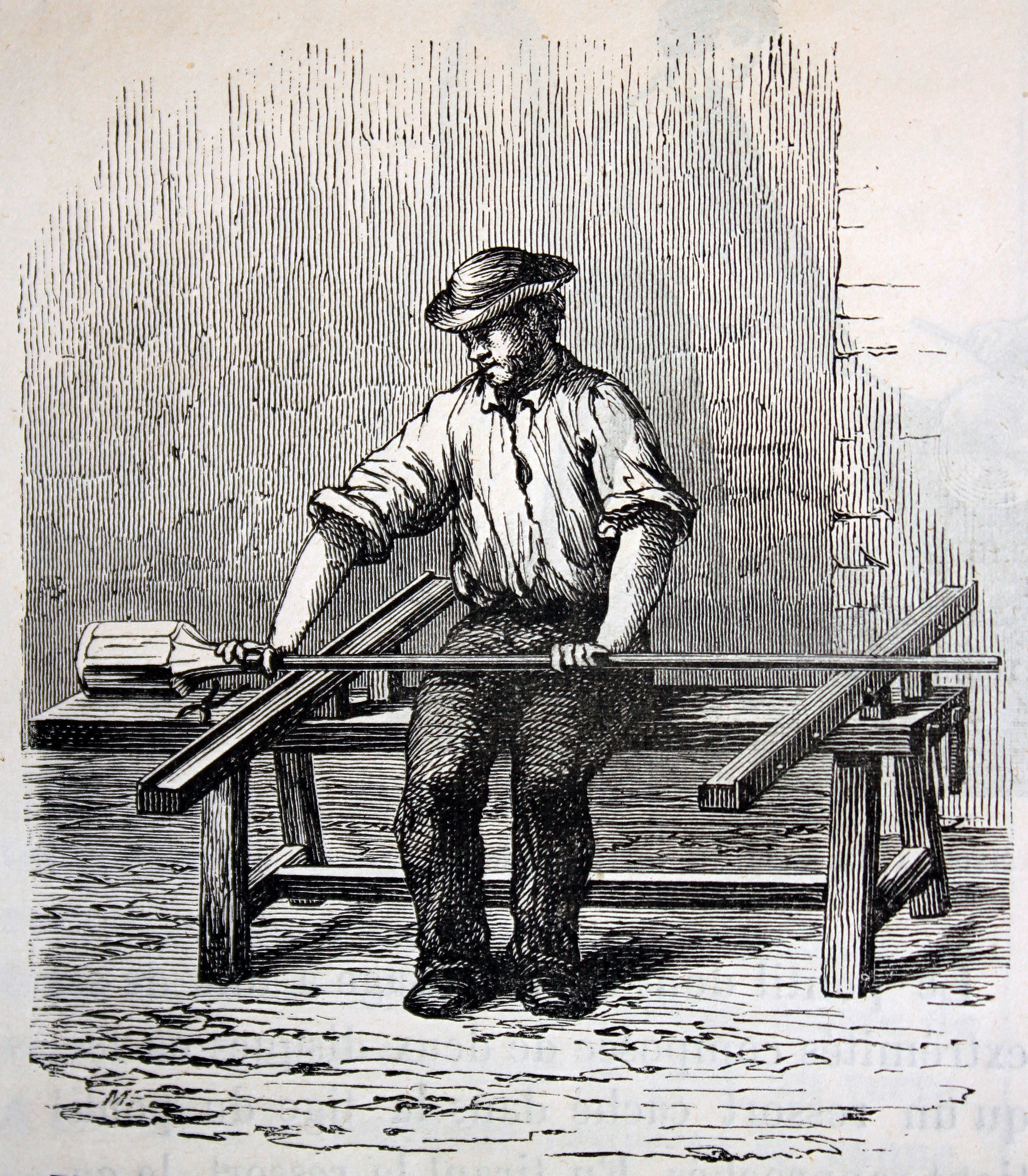 Ilustraciones de la obra : Les merveilles de l'industrie ou, Description des principales industries modernes / par Louis Figuier. - Paris : Furne, Jouvet, [1873-1877]. - Tome I